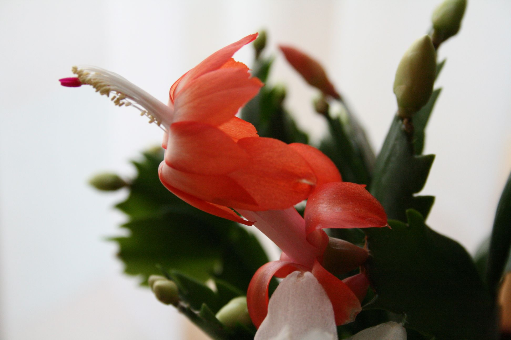 Schlumbergera truncata (Rhipsalideae; Cactaceae; Planta) kaktusz 'Malibu' változatának virága